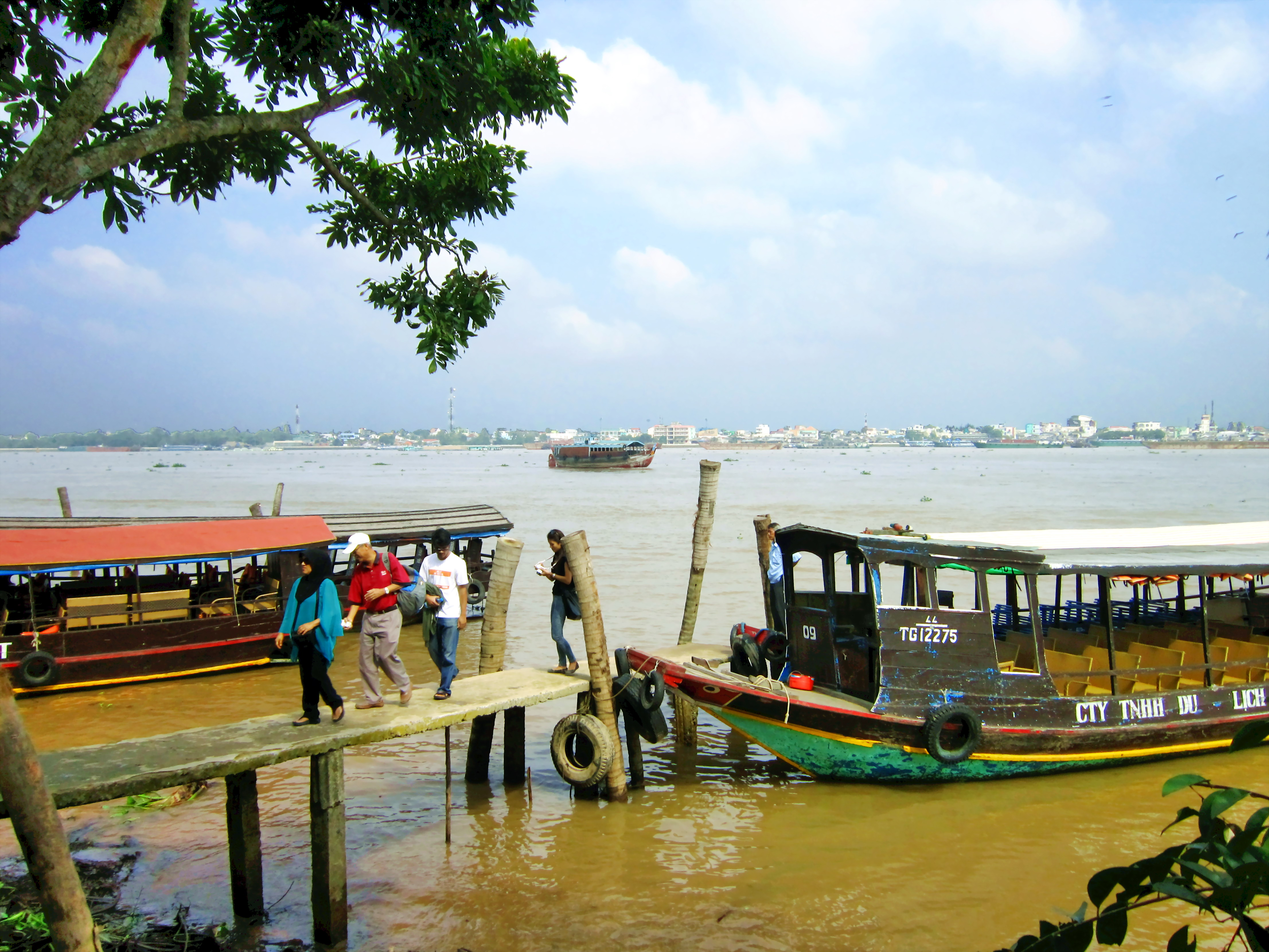 Tàu du lịch đưa khách đến tham quan một điểm bán mật ong trên cồn Lân thuộc TP Mỹ Tho, tỉnh Tiền Giang, Việt Nam,nguồn